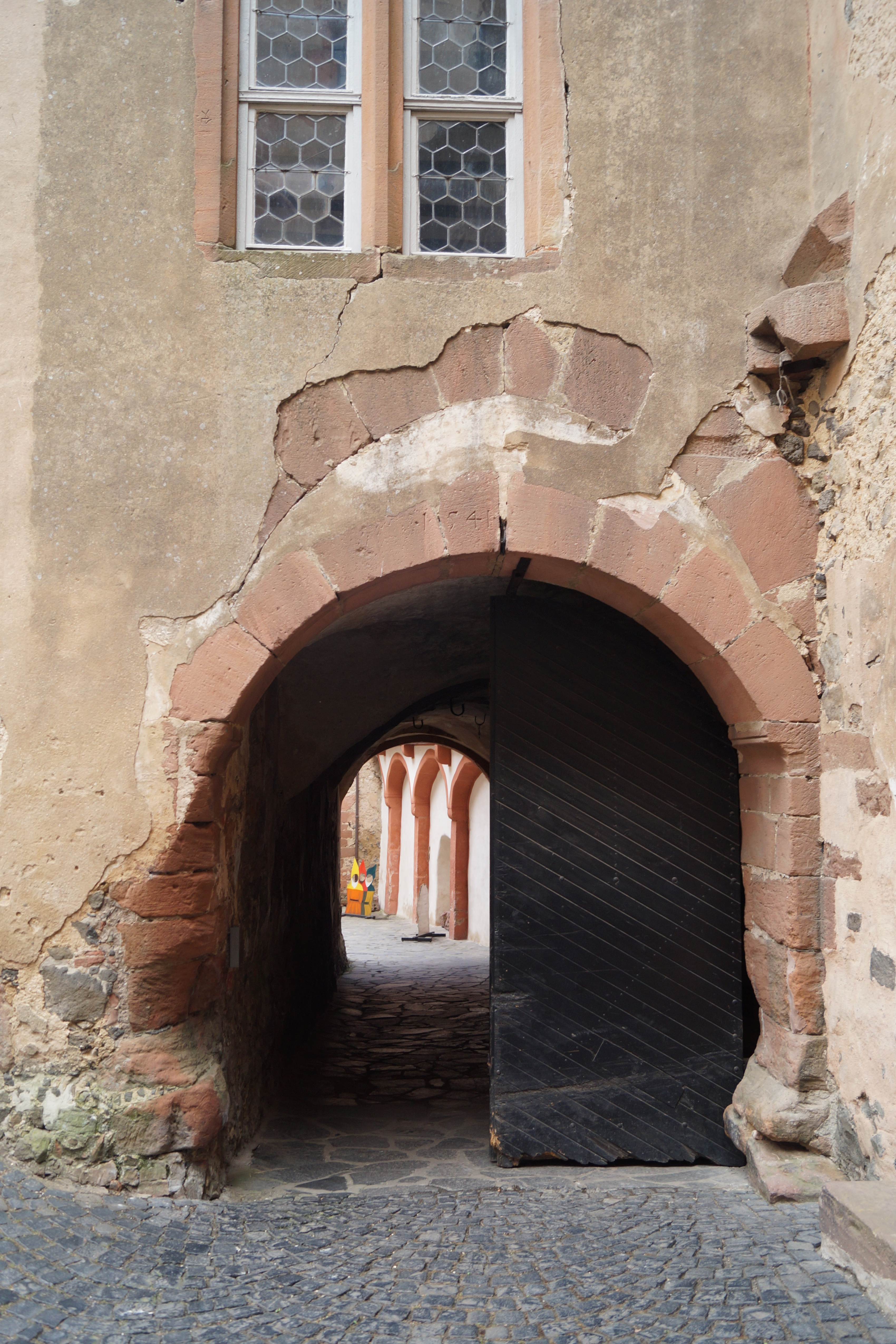 Burg Ronneburg, Hessen, Innenseite mit inneren Torbogen des vierten Torhauses (Zinzendorfbau). Teile der Kämpfer gelten als älteste Bauteile der Burg.